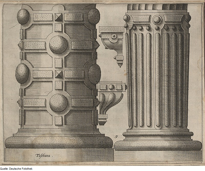 Original image description from the Deutsche Fotothek Architektur & Bauelement & Ornament & Säulenschaft & Basis & Postament & Piedestal & Kannelure & Torus & Trochilus